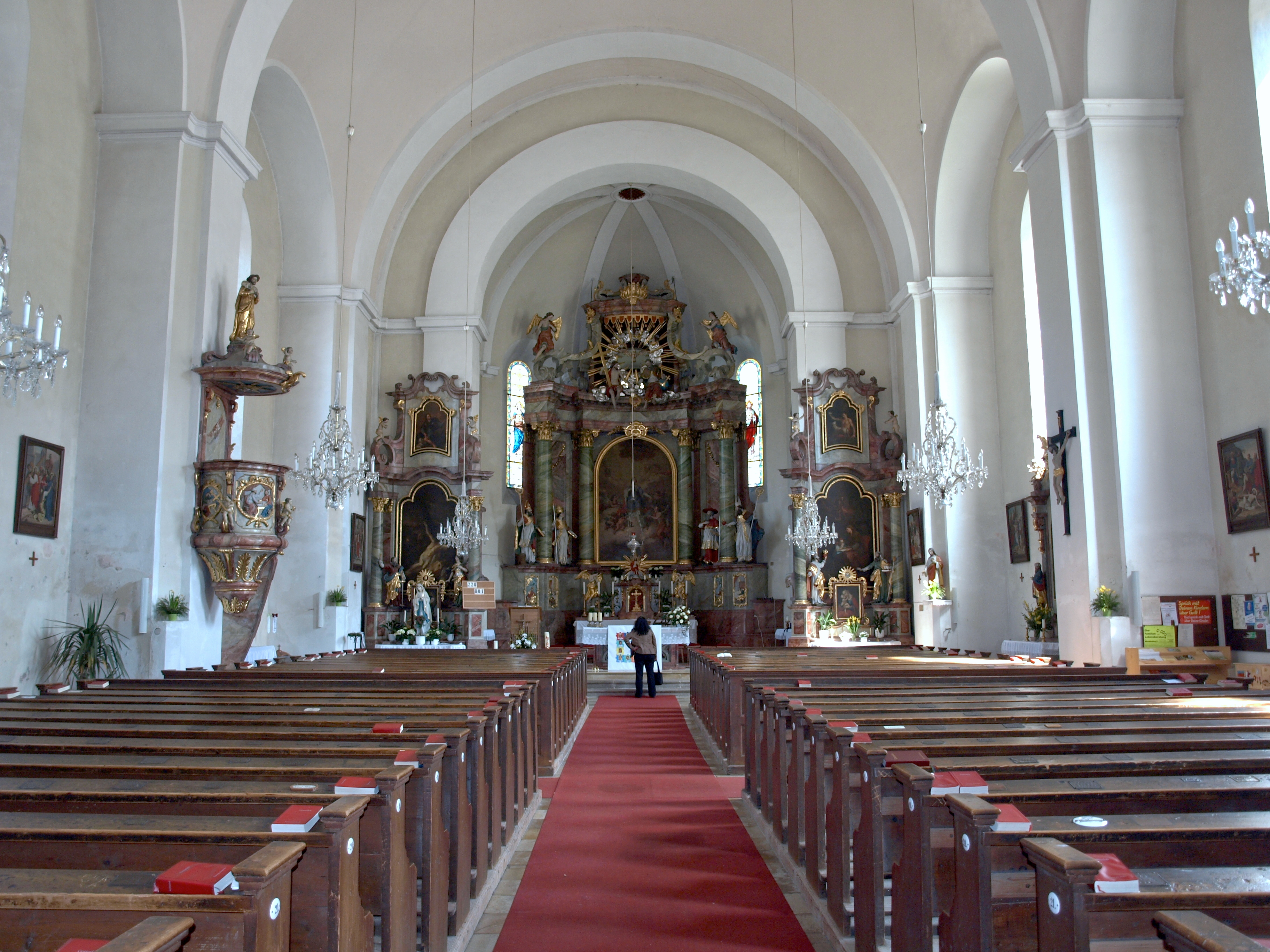 Kath. Pfarrkirche hl. Kunigunde